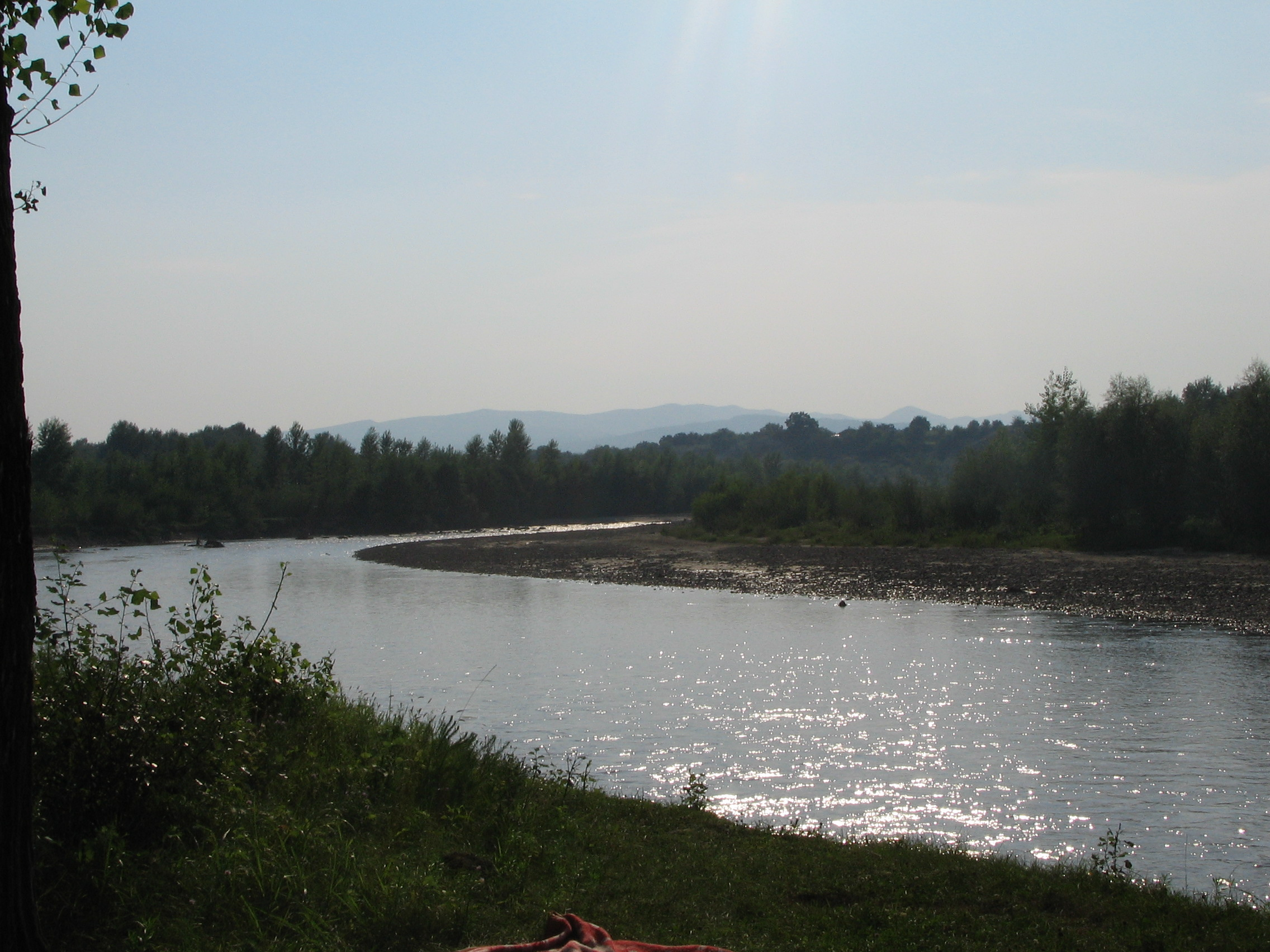 The Buzău river near Unguriu, Buzău, Romania